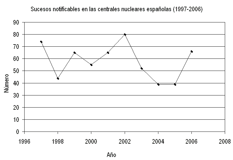 Sucesos notificables en España